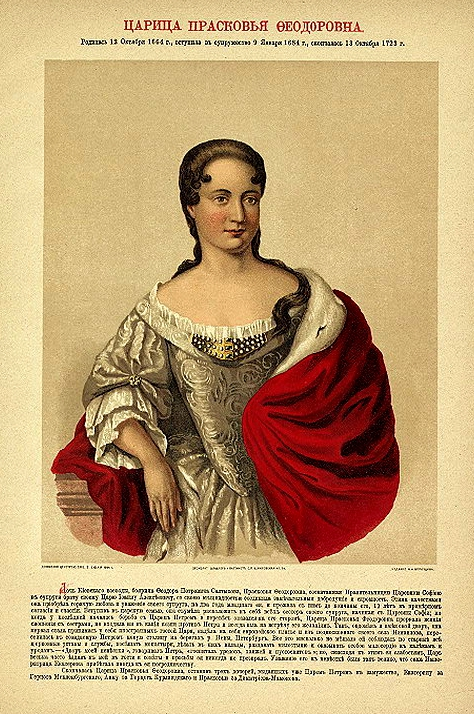 Praskowia Sałtykowa